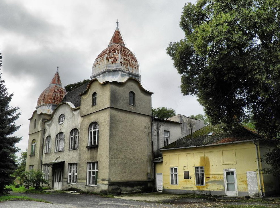 Droppa-kastély (Mezőszilas, Fő utca) This is a photo of a monument in Hungary, Identifier: 12432